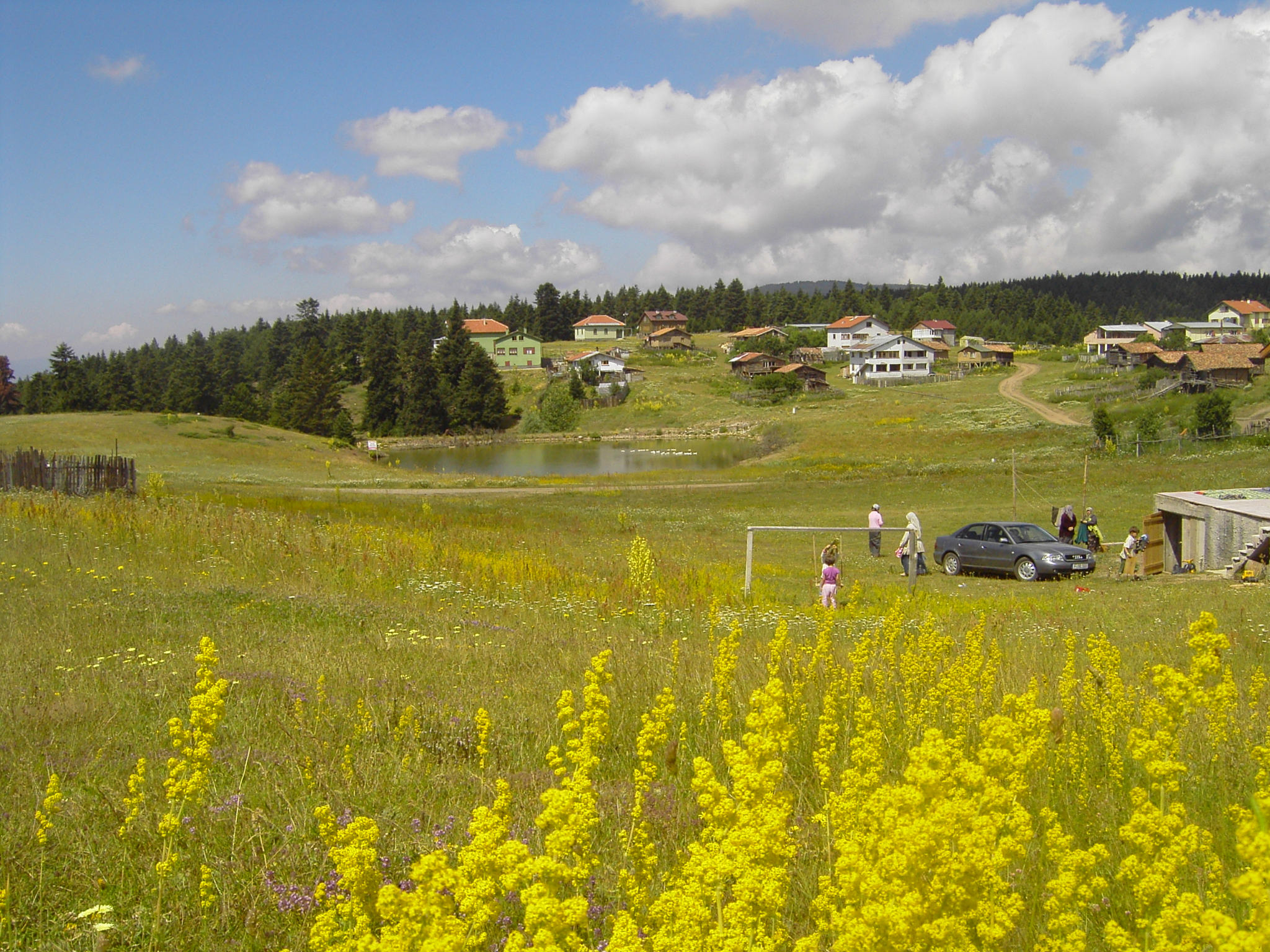 Gerede Afşartarakci Yaylasi